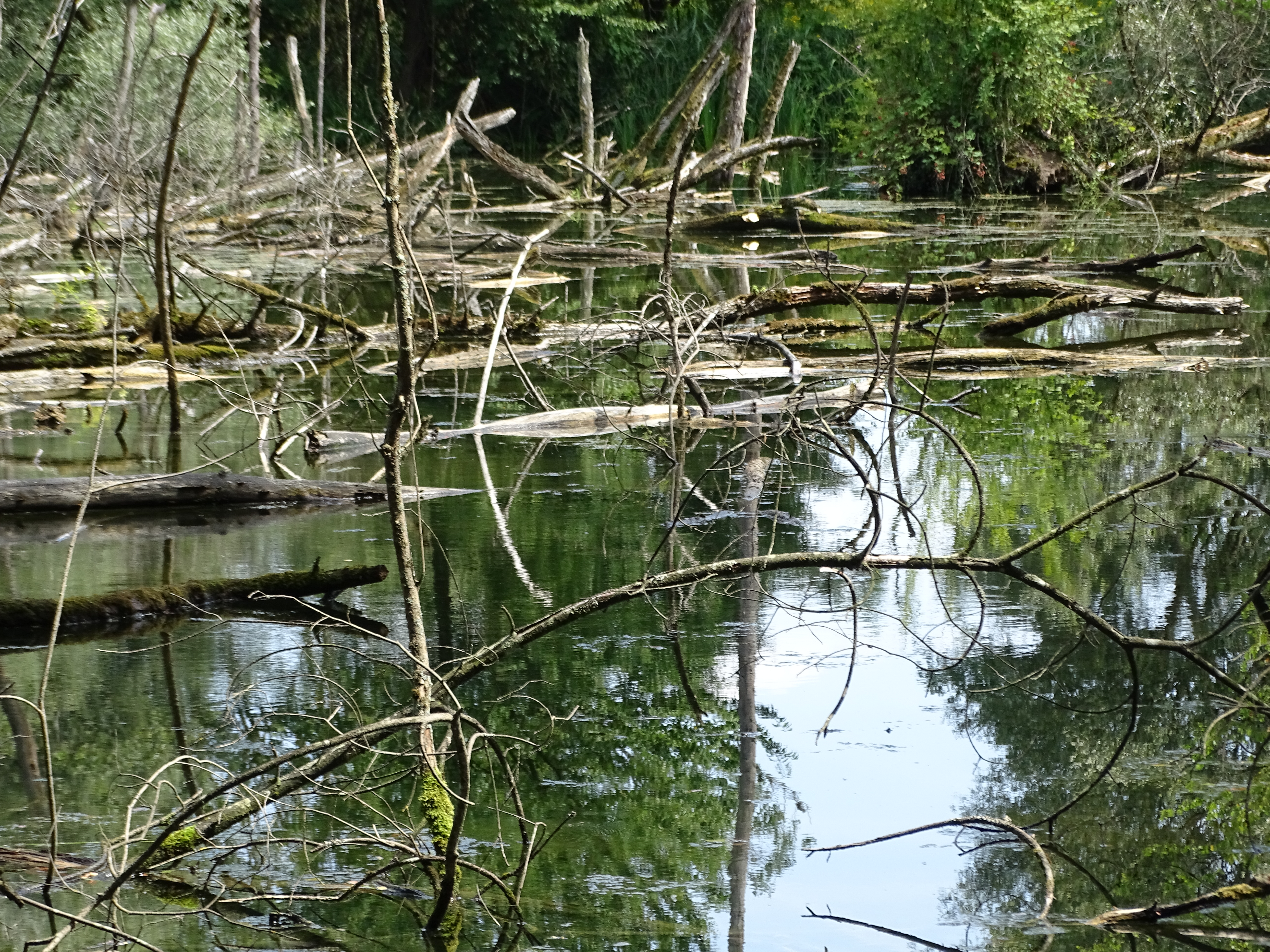 Naturreservat Petite Camargue Alasacienne bei Saint-Louis, Elsass